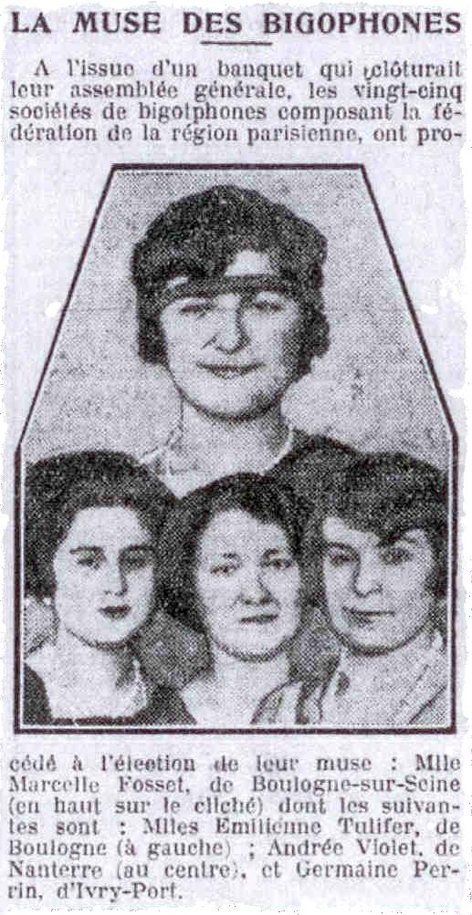 La muse des bigotphones de Paris 1928